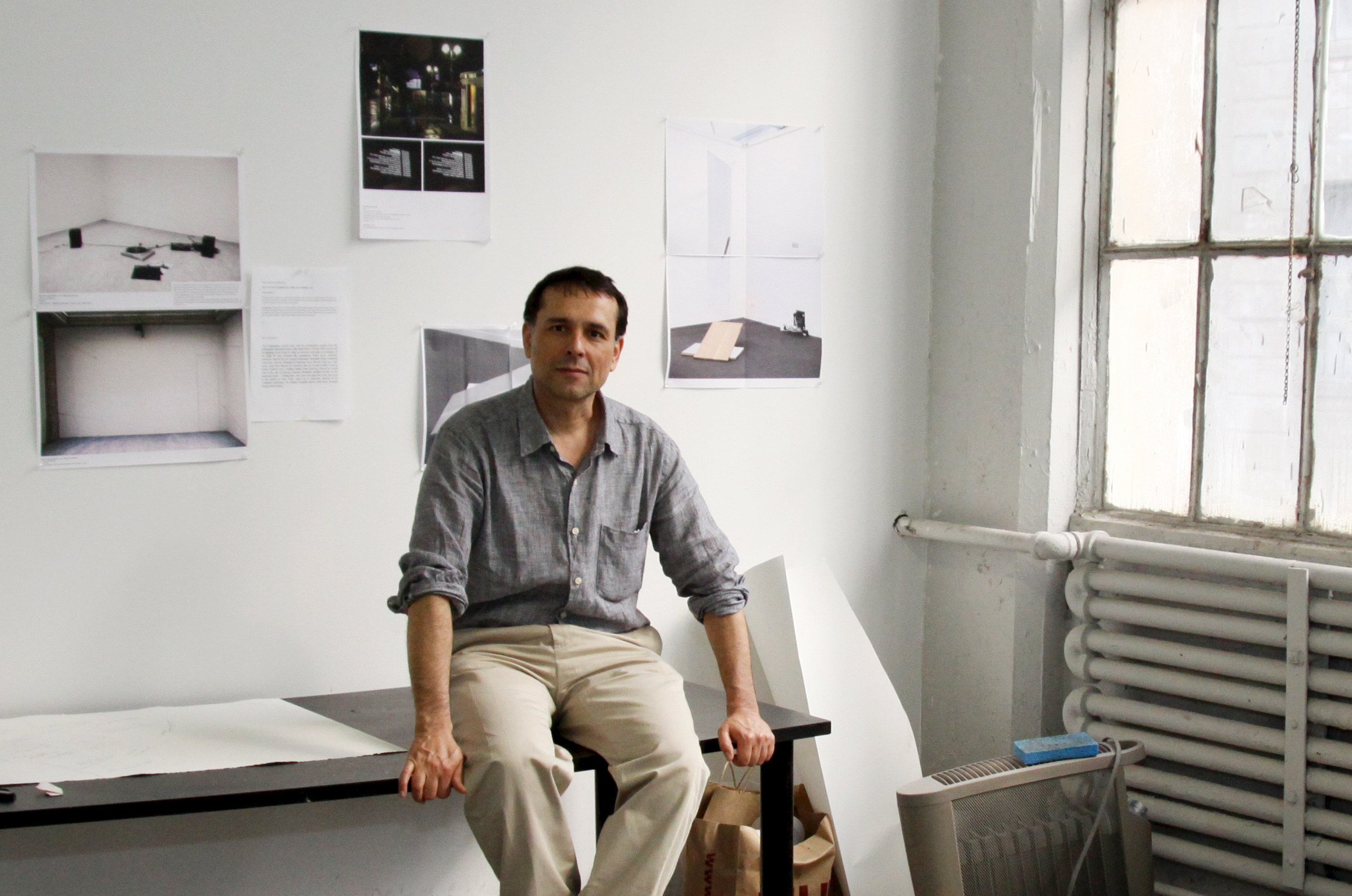 Vittorio Santoro, APT Studios, Brooklyn NY, Mai 2011 (Foto: George Go, New York, 2011)